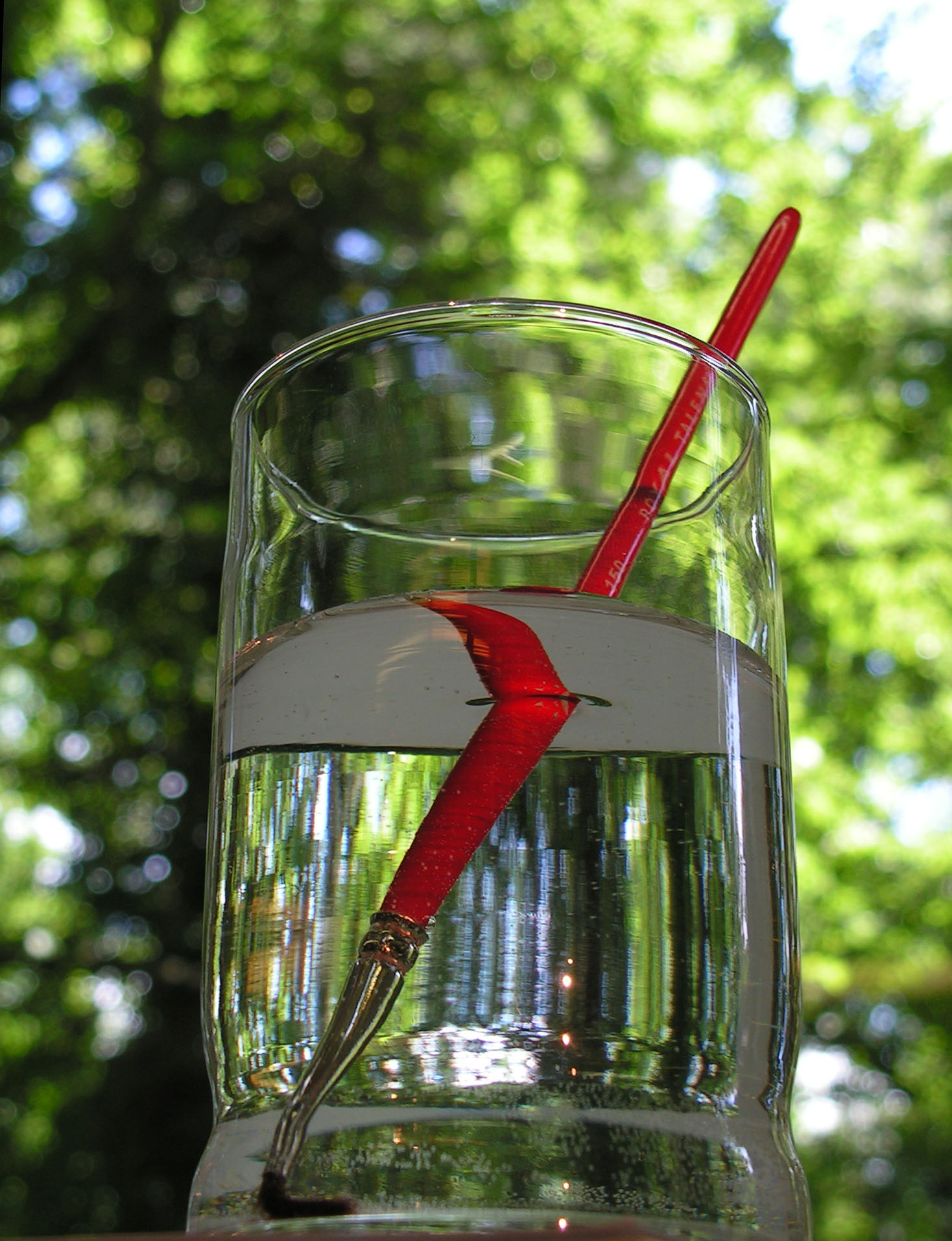 Réflexion totale de la lumière sur la partie inférieure d'un dioptre eau-air.